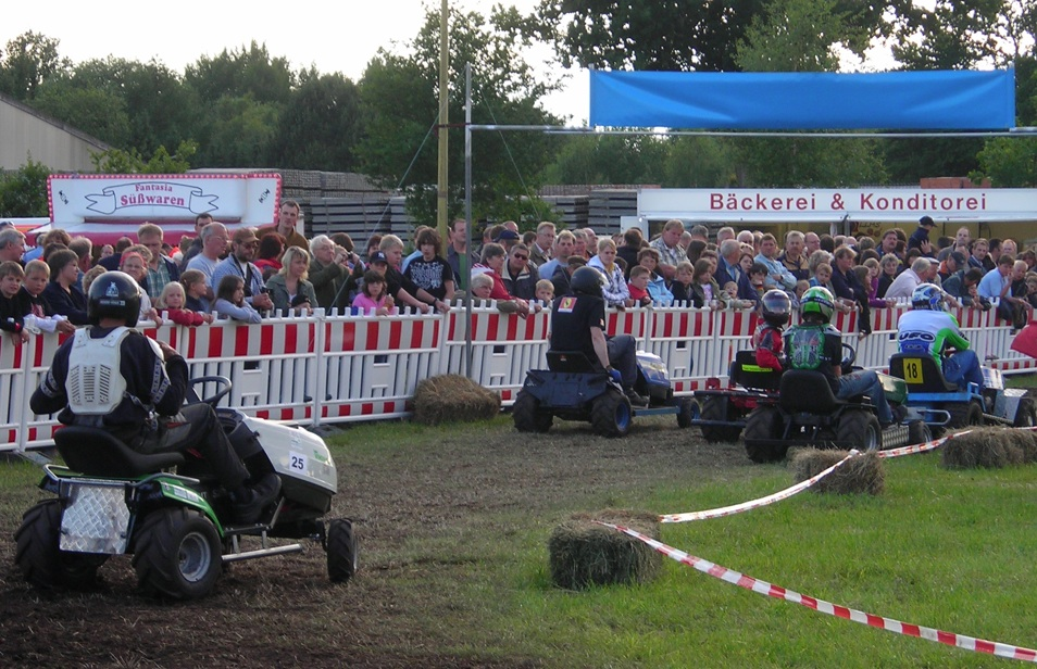 Rasenmäherrennen in Jeddeloh 2008 (oder 2009), Standardklasse